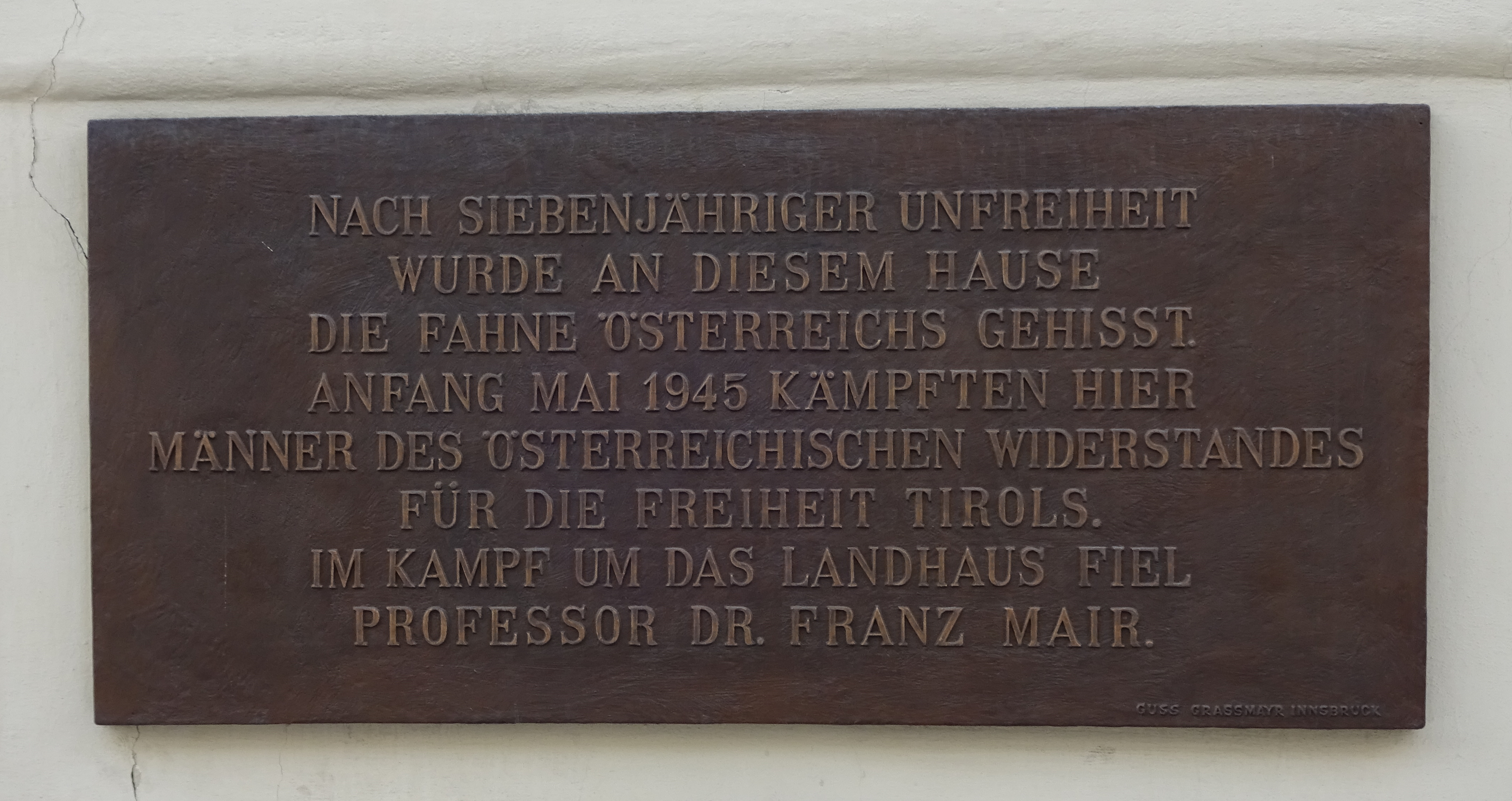 Gedenktafel für Prof. Franz Mair am Alten Landhaus in Innsbruck